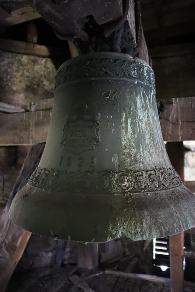 Jeden z dzwonów, jakie pierwotnie znajdowały się w kaplicy. Obecnie kościół pw. Narodzenia Najświętszej Maryi Panny w Chmielnie